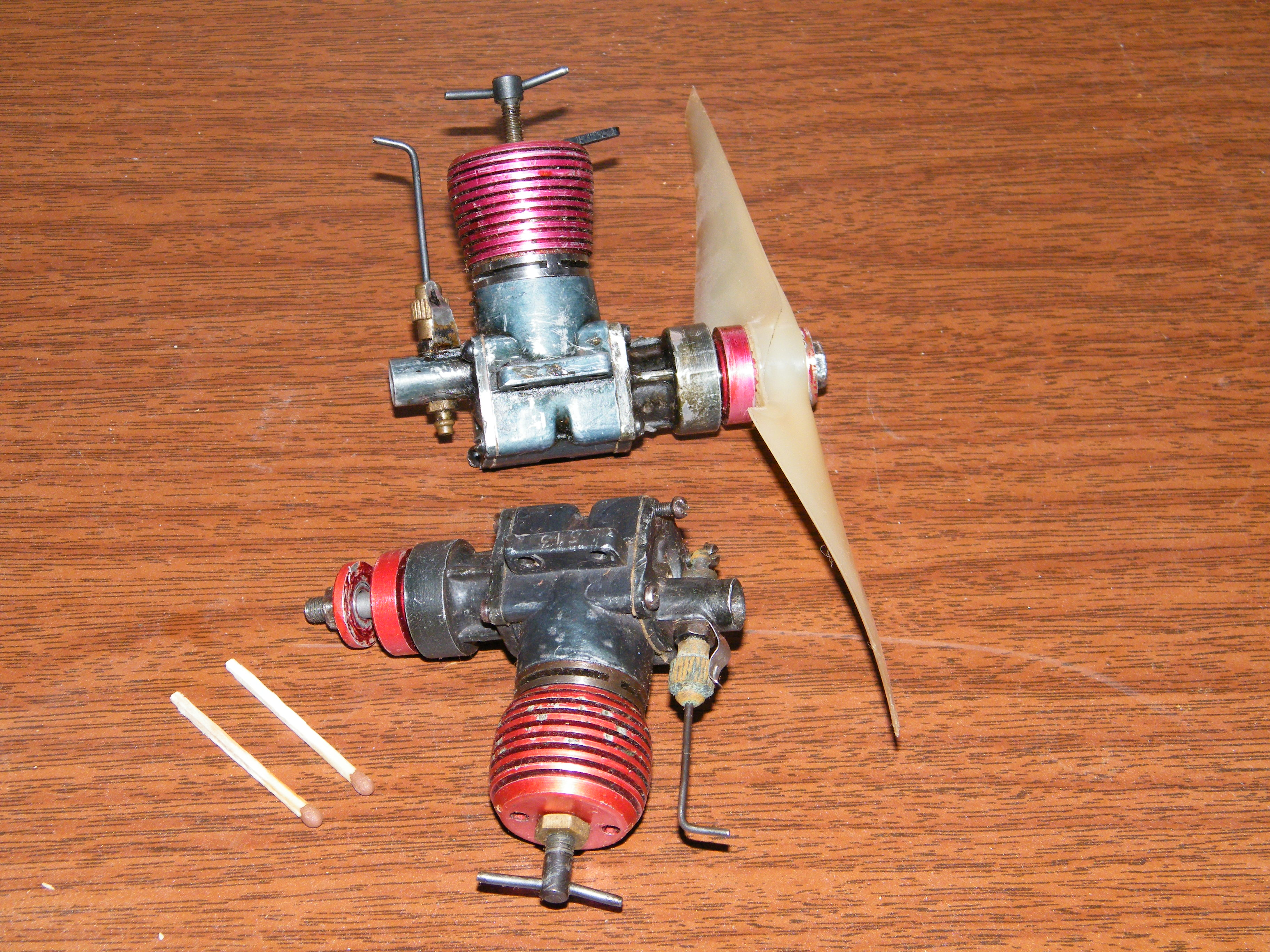 Авиамодельный компрессионный двигатель МК-12В. СССР, 1979-е годы.